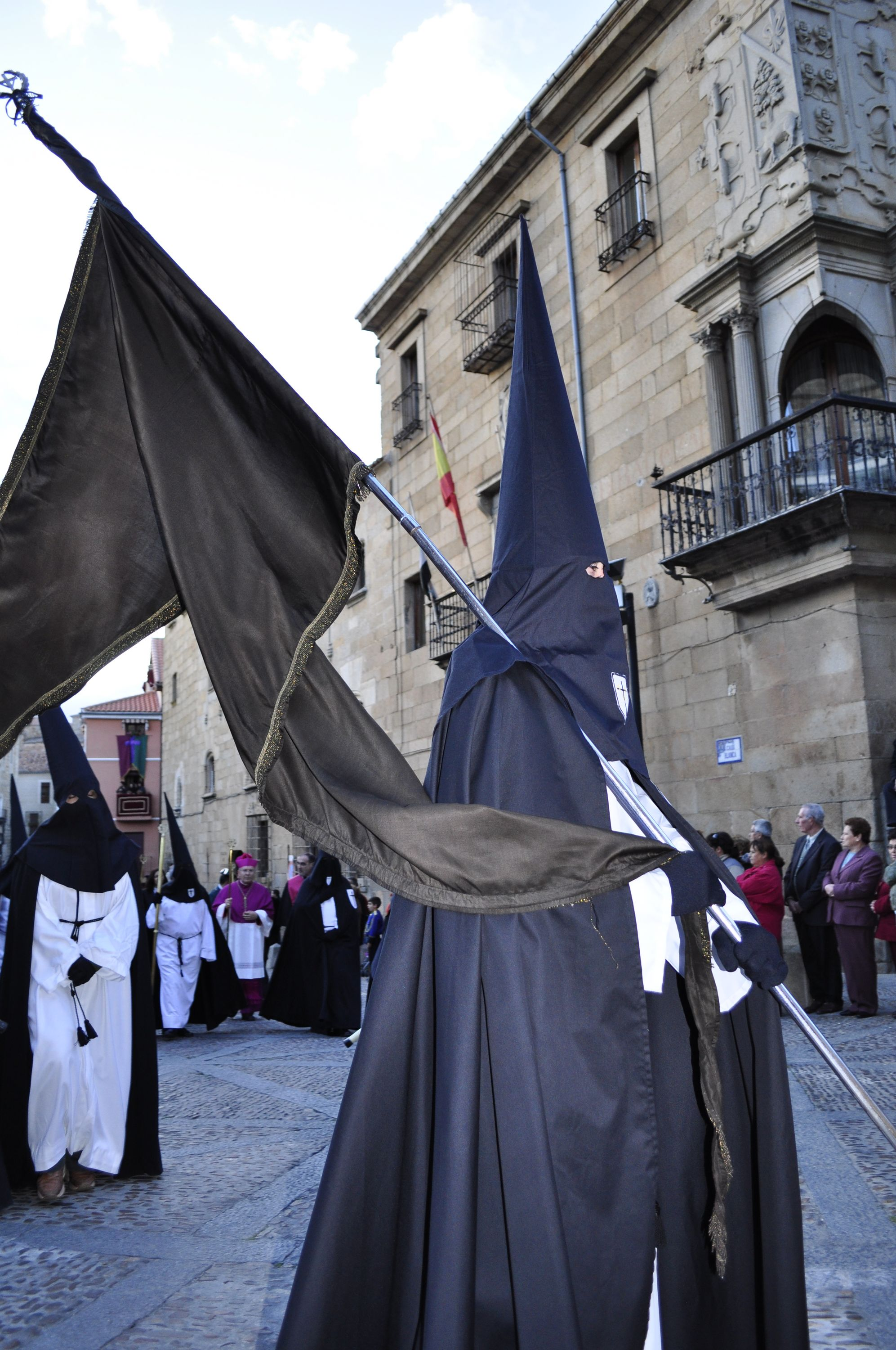 Cofradia de la Soledad y Santo Sepulcro. Hermano Mayor: Narciso Juanals Parroquia: Santo Domingo Año de Fundación: Comienzos del Siglo XV Hermano Mayor: Narciso Juanals Hora de salida: 19,30 horas Pasos:Nuestra Señora de la Soledad, Santo Sepulcro, San Juan María Magdalena y San Pedro Acompañamiento musical: La banda de música de la OJE de Plasencia Número de hermanos de la cofradía: 700 (